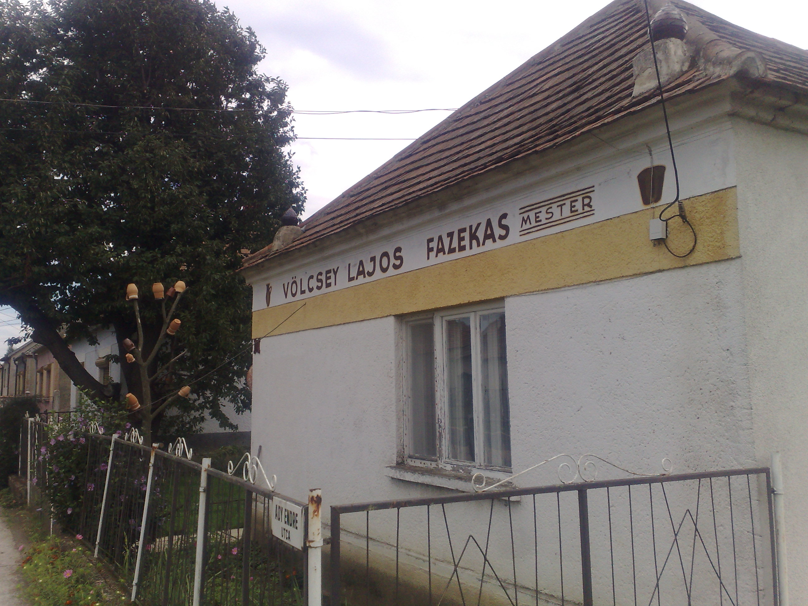 Völcsey Lajos döri fazekasmester háza